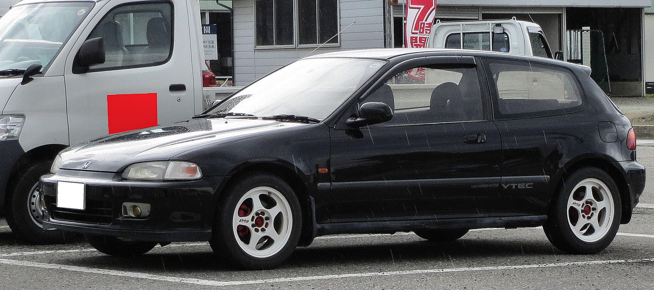 ホンダ EG シビック SiR